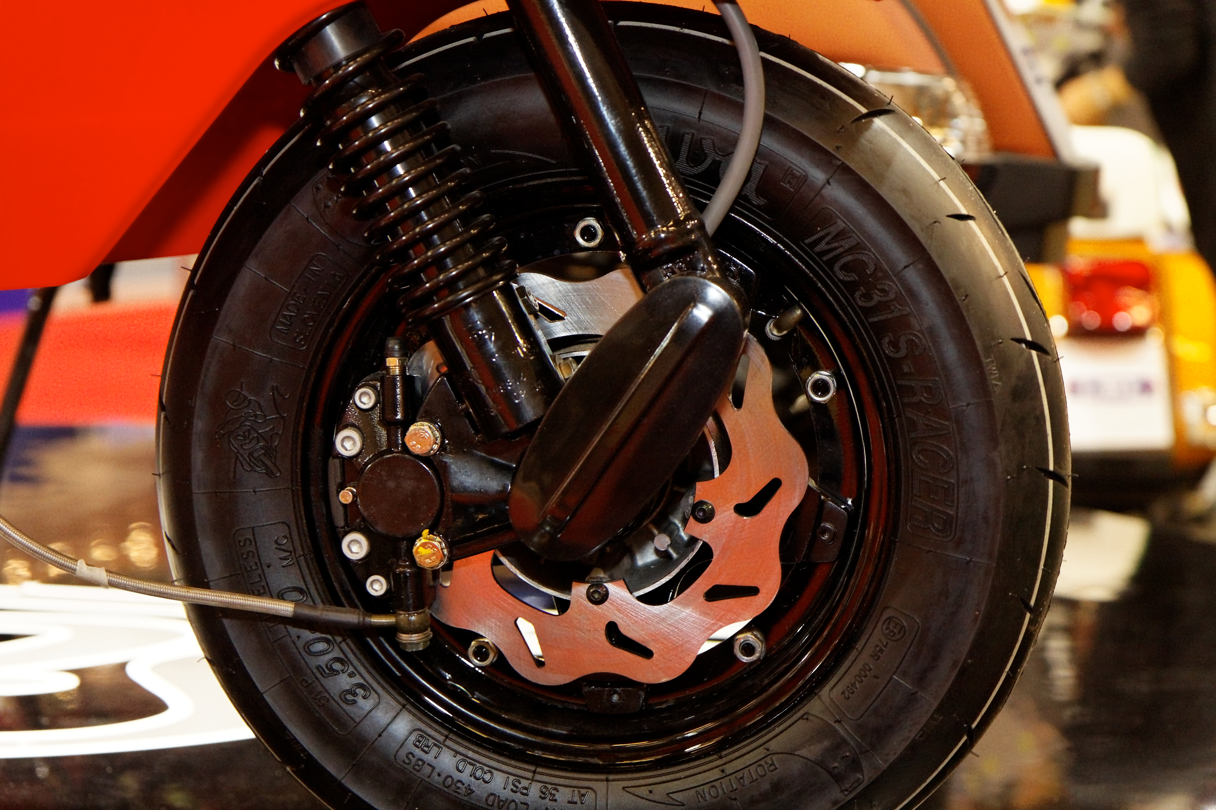 LML - Star 4